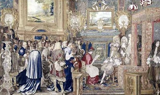 Jean Mozin, Suite de l’Histoire du Roi, 3e série 7e pièce : « Audience accordée par le Roi au Cardinal Chigi, légat du pape à Fontainebleau le 29 juillet 1664 », d’après le carton de Saint‑André 1665‑1680, XVIIe siècle,château de Versailles